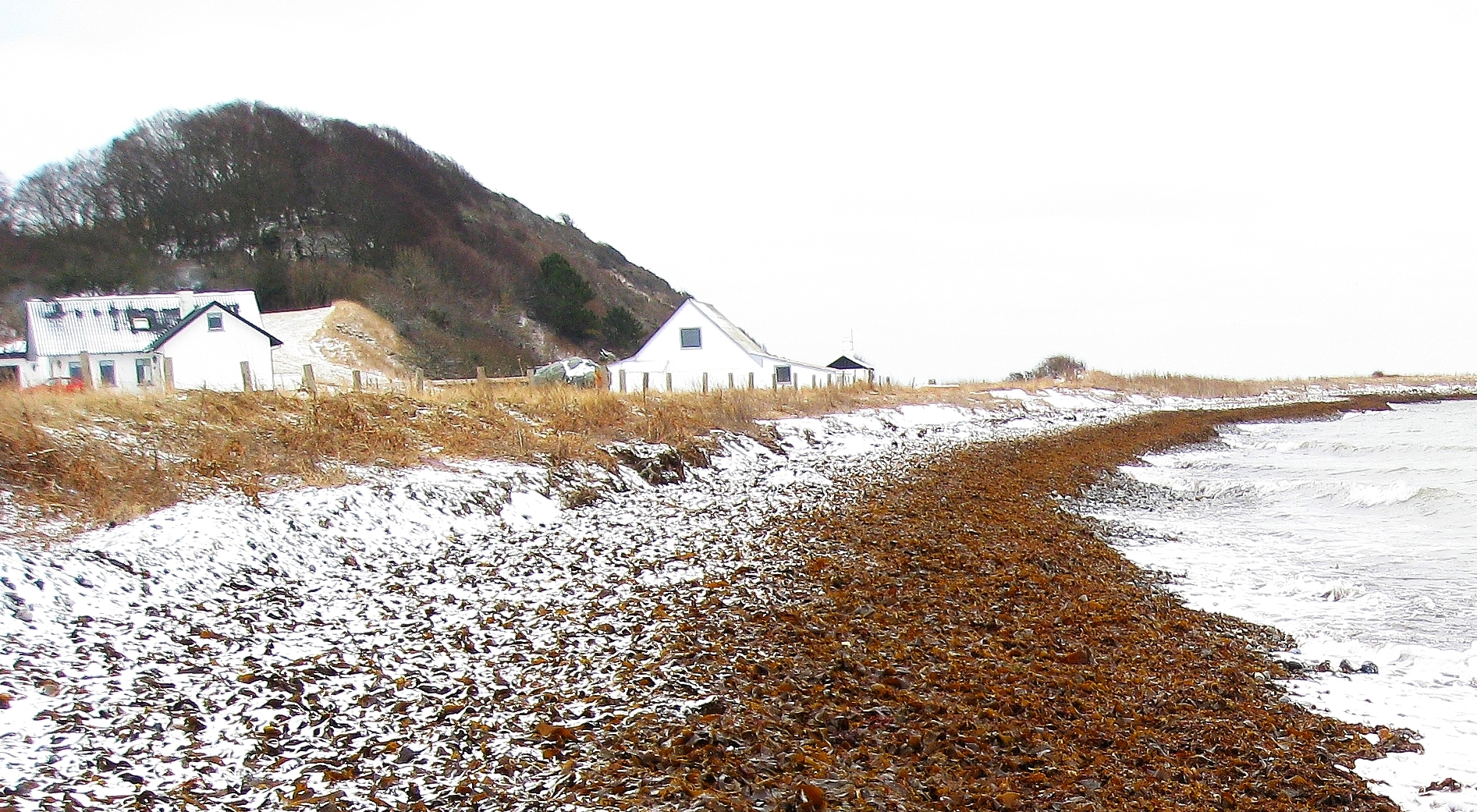 Jernhatten, vinterbillede